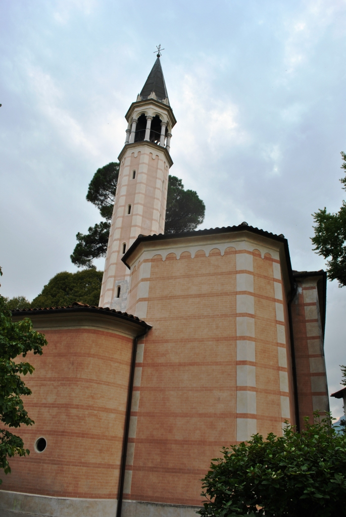 Giardino e Teatro Jacquard (con Medaglioni Teatro Jacquard, Busto di Sebastiano Bologna, Edicola F. Rossi) This is a photo of a monument which is part of cultural heritage of Italy.